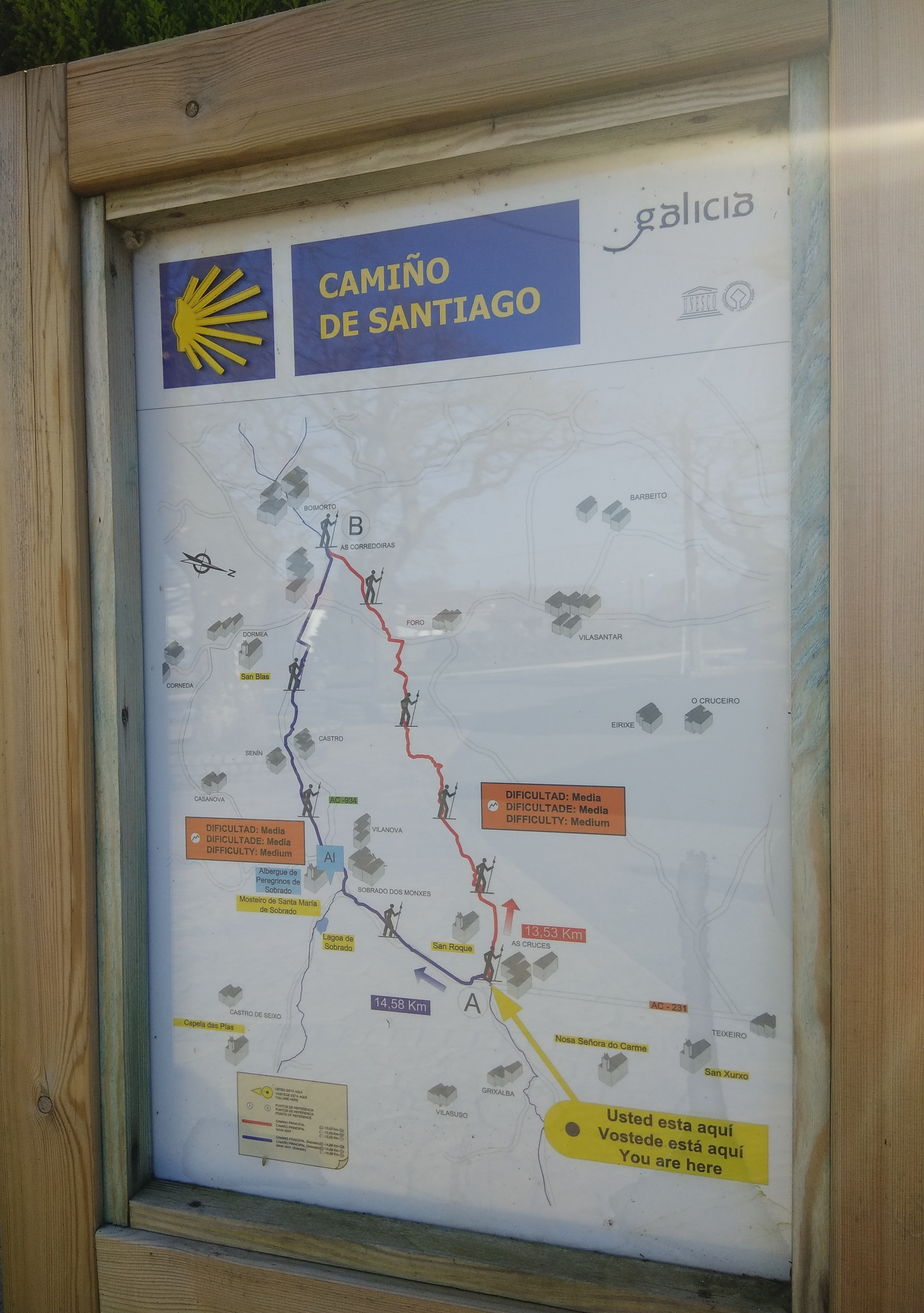 Panel informativo nas Cruces (Sobrado) sobre o trazado do Camiño de Santiago (Camiño do Norte).